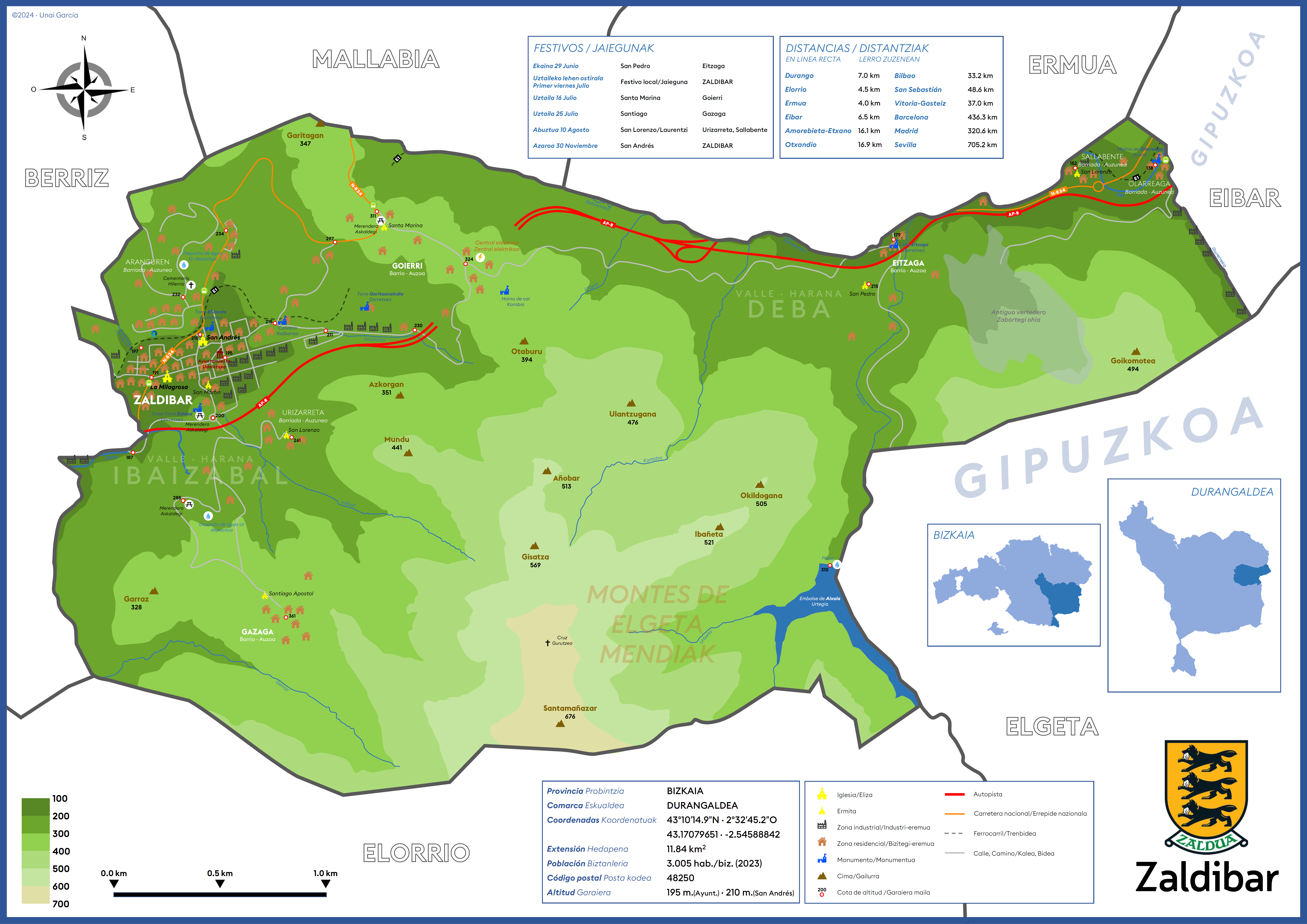 Termino municipal de Zaldibar